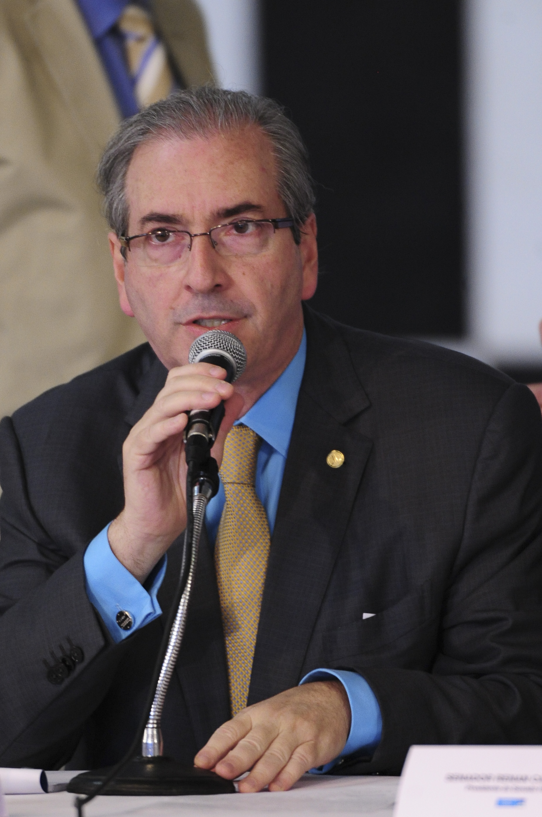 O presidente do Senado Federal, senador Renan Calheiros (PMDB-AL), e o presidente da Câmara dos Deputados, Eduardo Cunha (PMDB-RJ), recebem prefeitos e autoridades do Poder Legislativo no Salão Negro do Congresso Nacional para debater o pacto federativo e desenvolvimento regional. Em pronunciamento, o presidente da Câmara dos Deputados, Eduardo Cunha (PMDB-RJ). Foto: Pedro França/Agência Senado